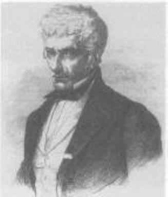 Johann Philipp von Wessenberg austrian politician